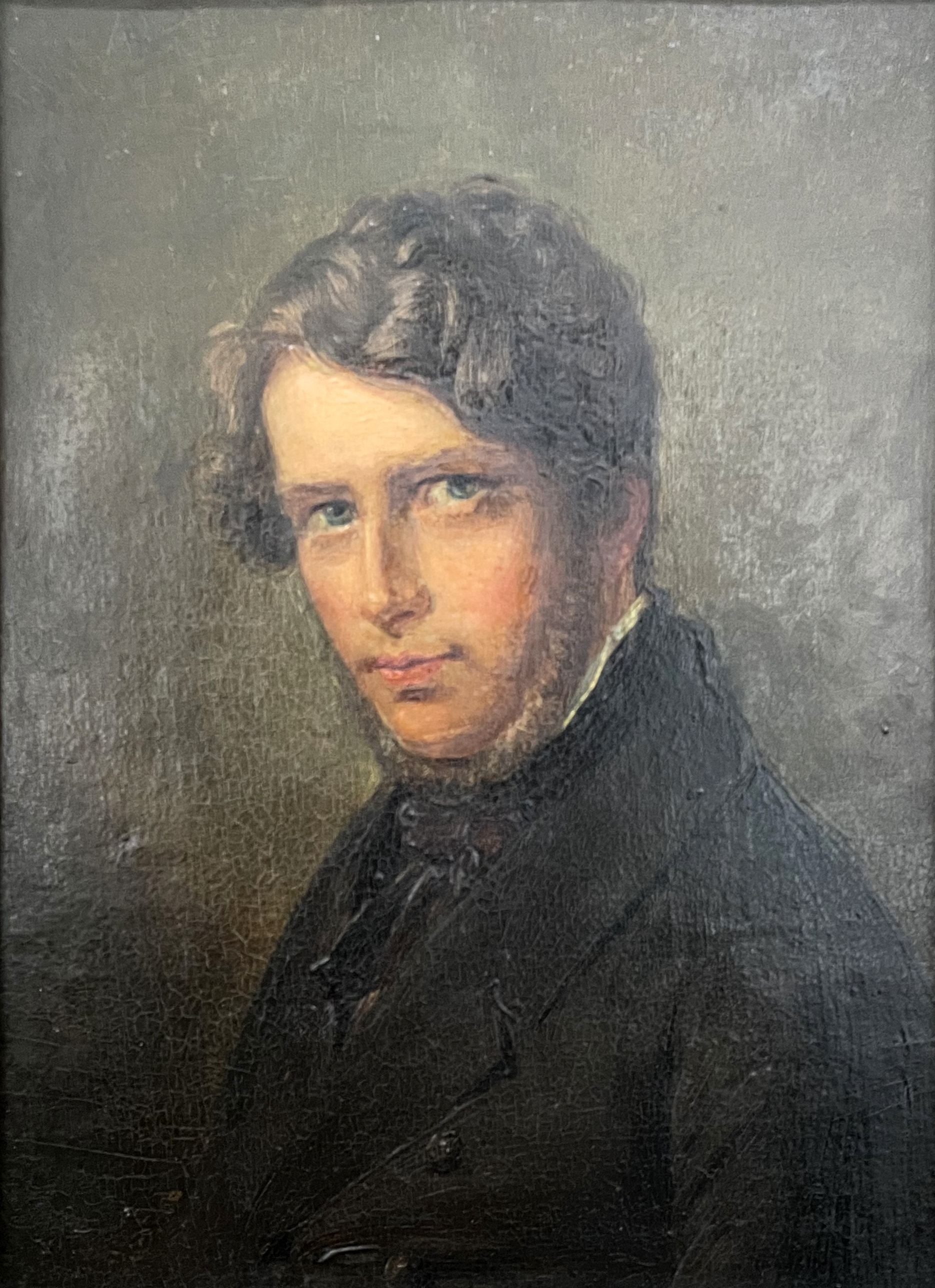 15 Ritter - Porträt Henry Ritter (1816–1853) - in Freundschaftsgalerie von Einzelbildnissen der Düsseldorfer Malerschüler und ihren Freunden (Vermächtnis des Künstlers)